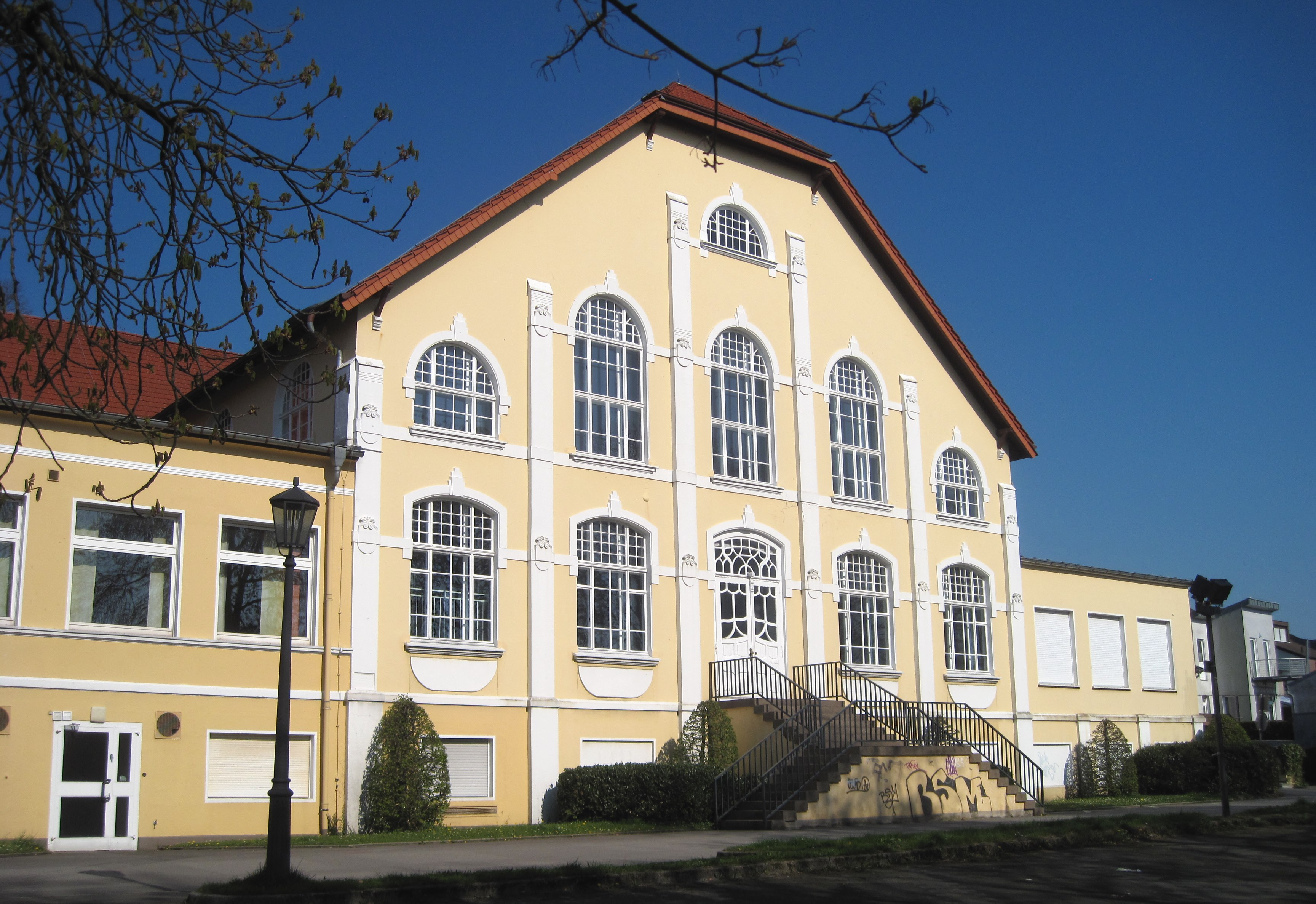 Städtische Saalbetriebe Wilhelmshöhe, Schwitter Weg in Menden (Sauerland). This image shows a heritage building in Germany, located in the North Rhine-Westphalian city Menden (Sauerland) (no. 46).